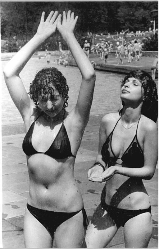 ADN-ZB Franke 15.5.82 Berlin: Manuela (l.) und Gabi zog es wie viele badelustige Berliner am Sonnabend zum kühlen Naß in das Freibad Pankow.